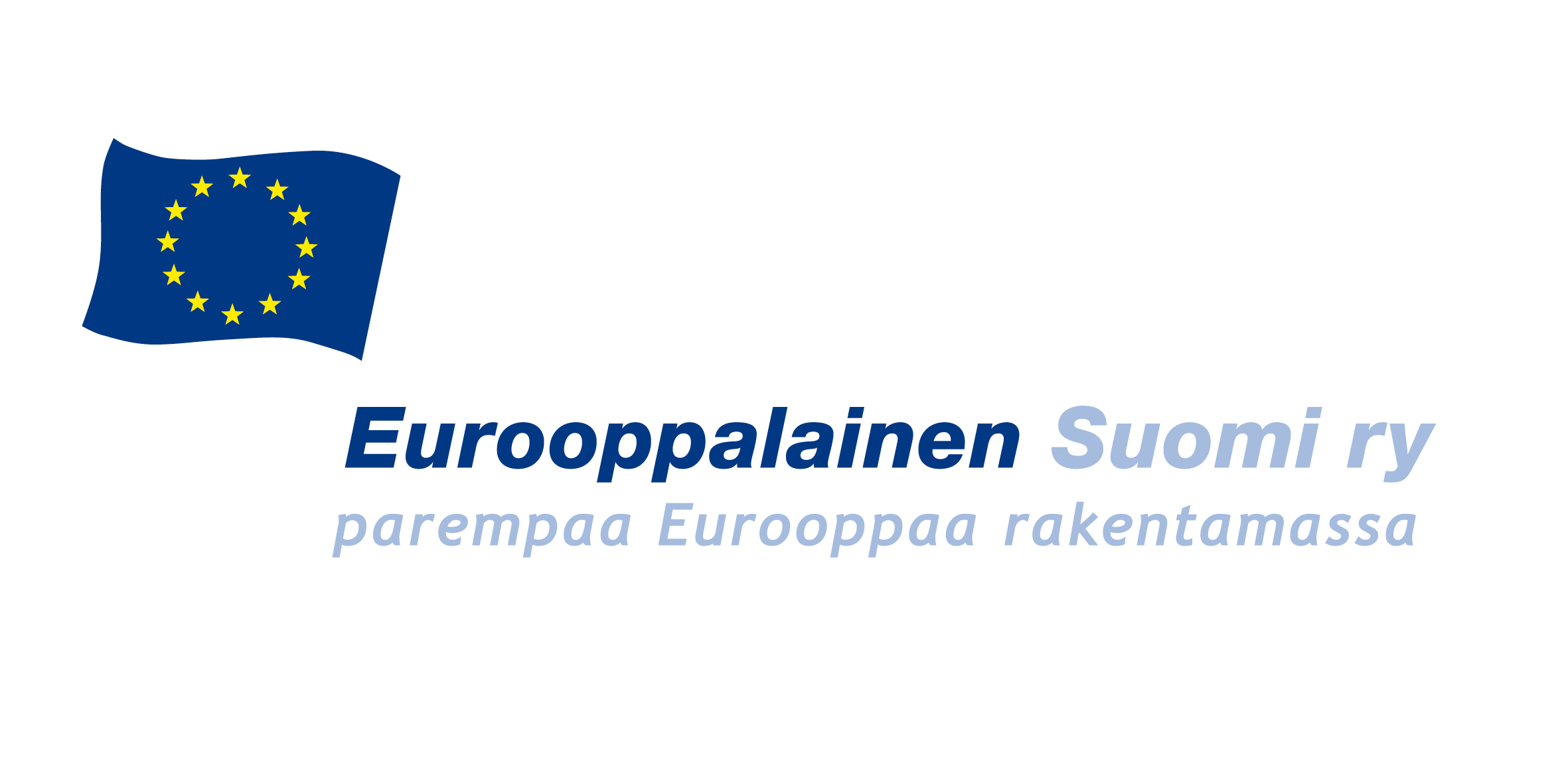 Yhdistyksen logo